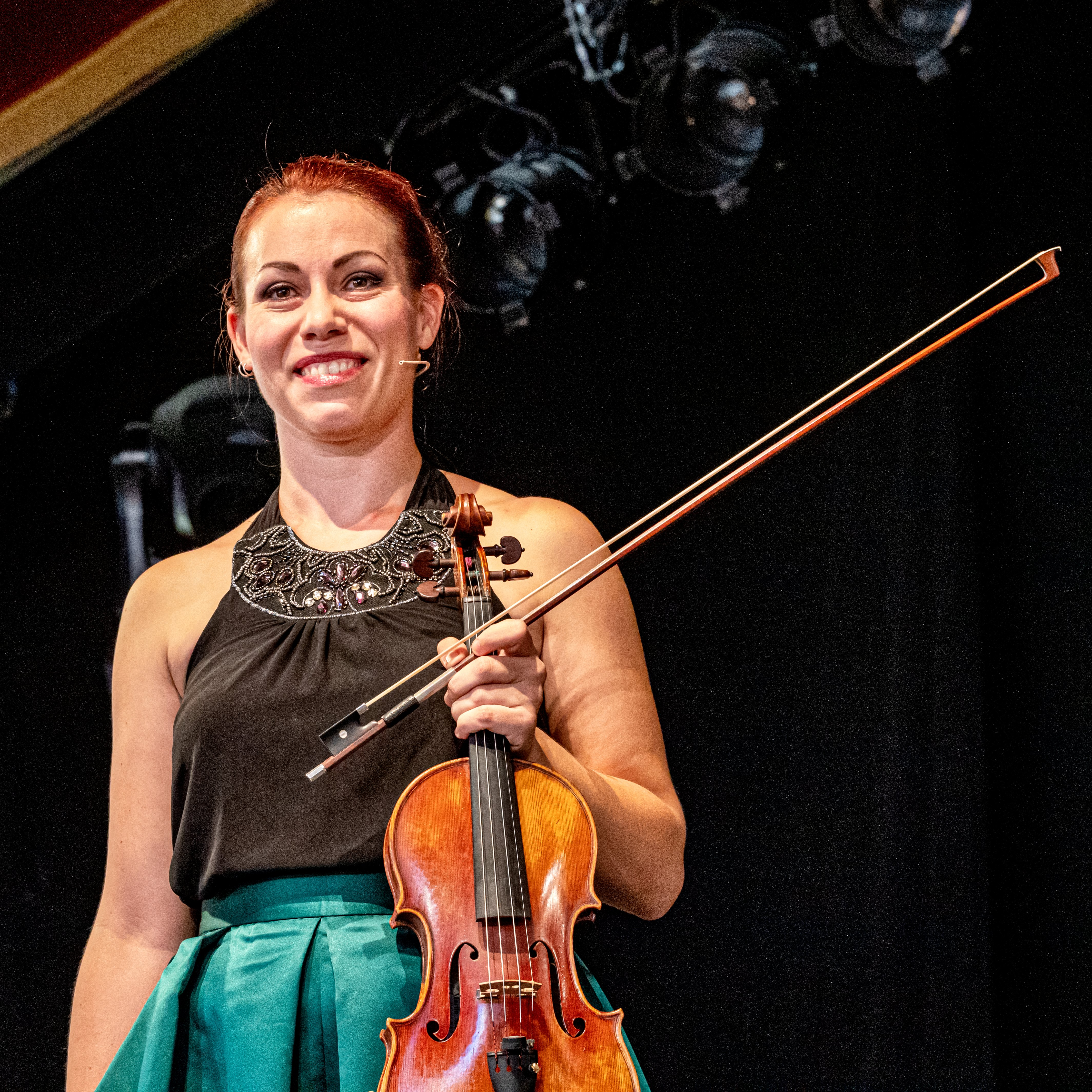 Bilder vom Zelt Musik Festival 2019 in Freiburg im Breisgau Hier die Matinee "Die_kleine_Fiesta"